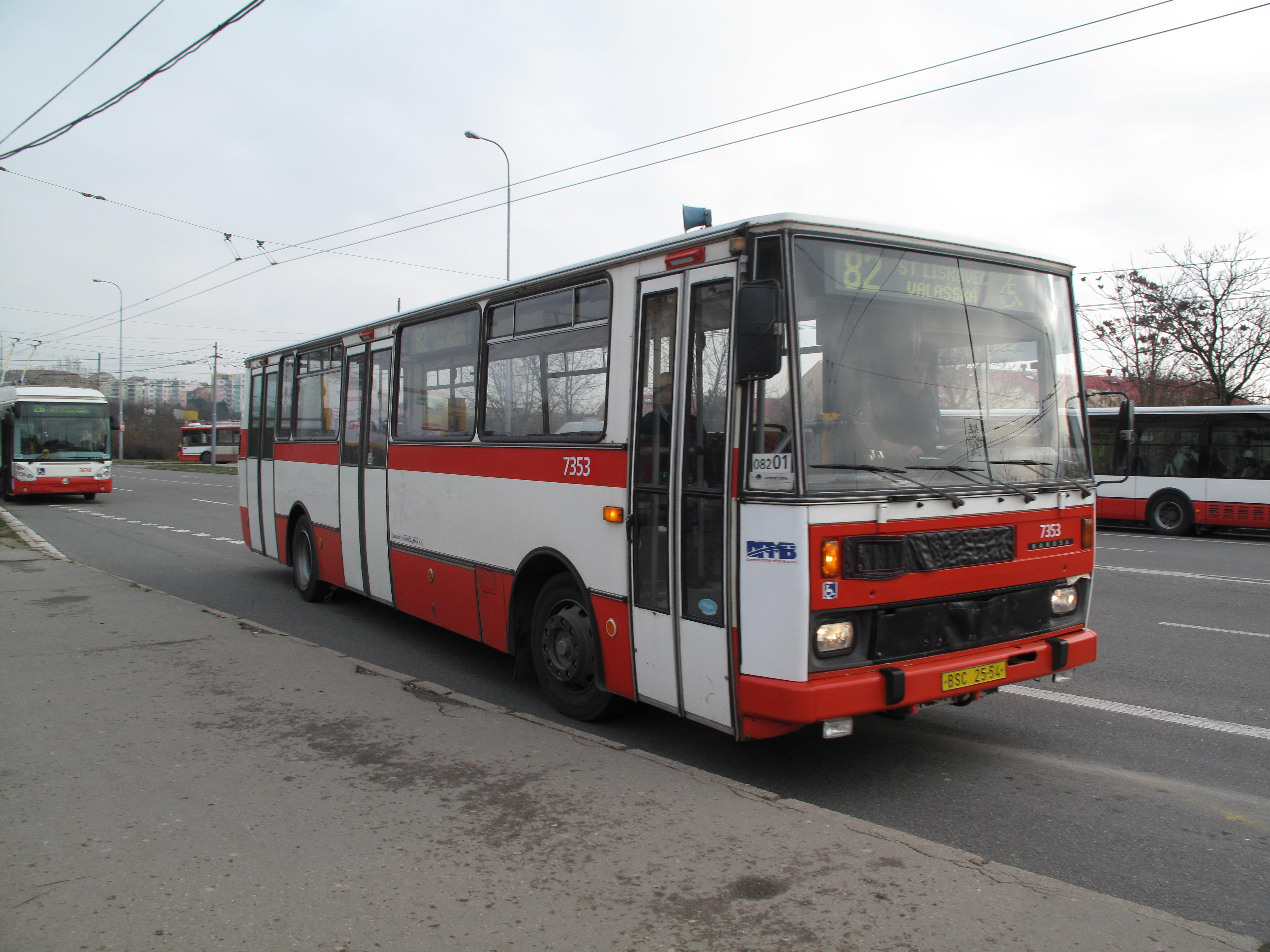 Karosa na lince č. 82